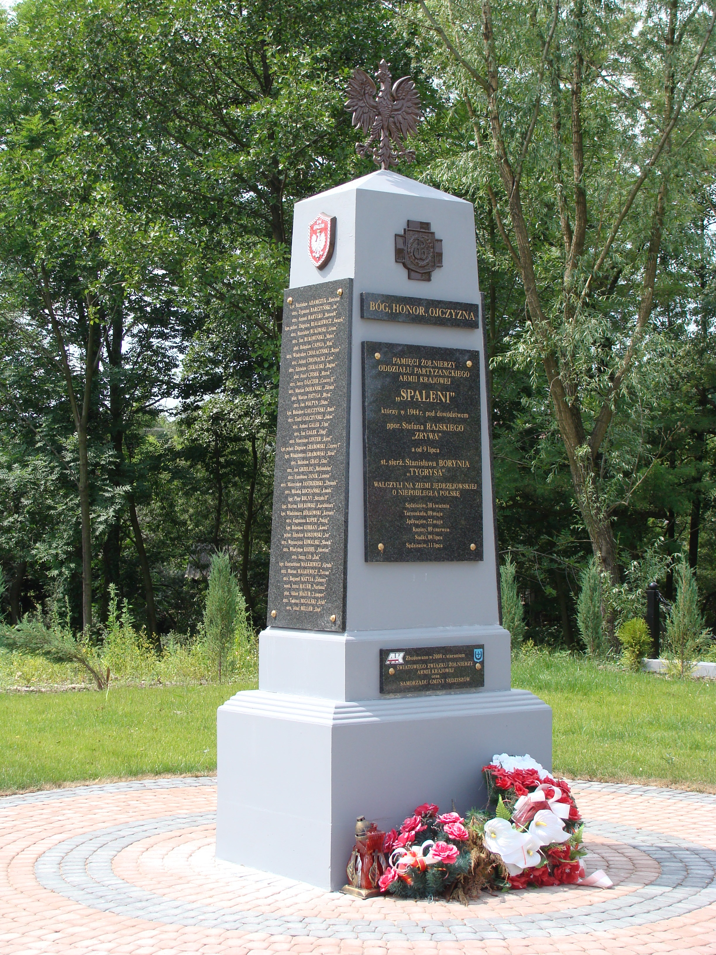 Sędziszów - Pomnik ku pamięci oddziału AK "Spaleni"